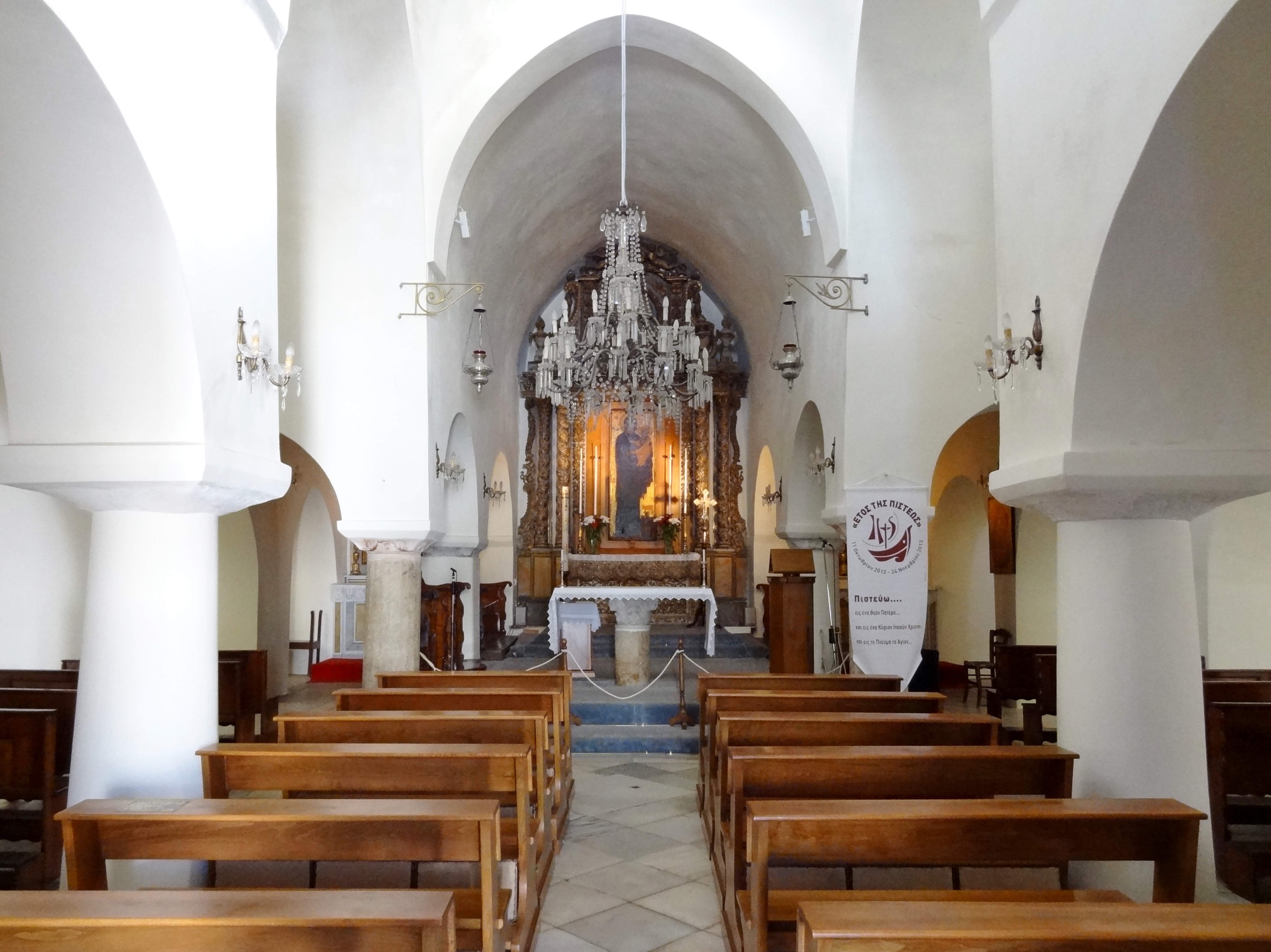 Innenraum der Katholischen Kirche in Chora, Naxos, Kykladen, Griechenland